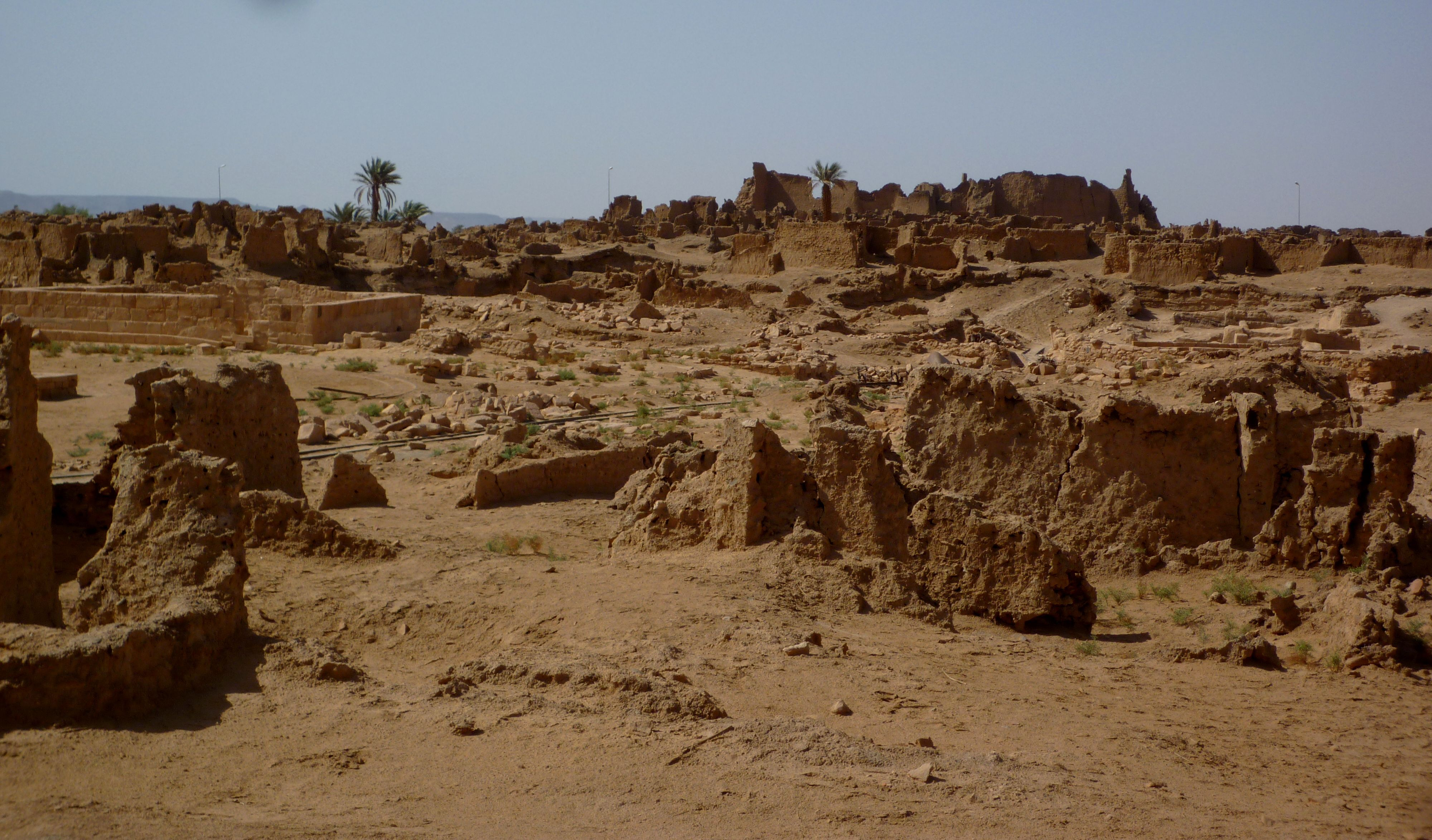 Garma (Garama)-Ruinen der antiken Stadt Garama